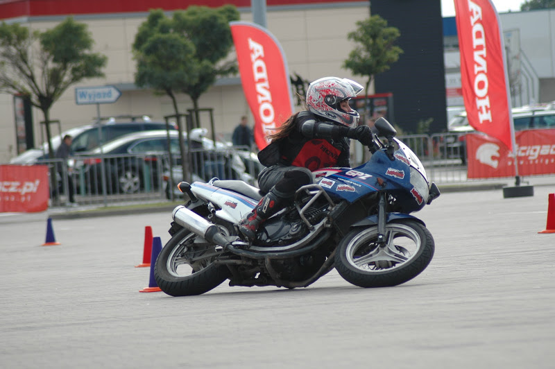 Aleksandra Frost, vicemistrzyni kategorii kobiet sezonu 2012 Honda Gymkhana, w czasie przejazdu na rundzie finałowej, Warszawa - Marki, 16 września 2012